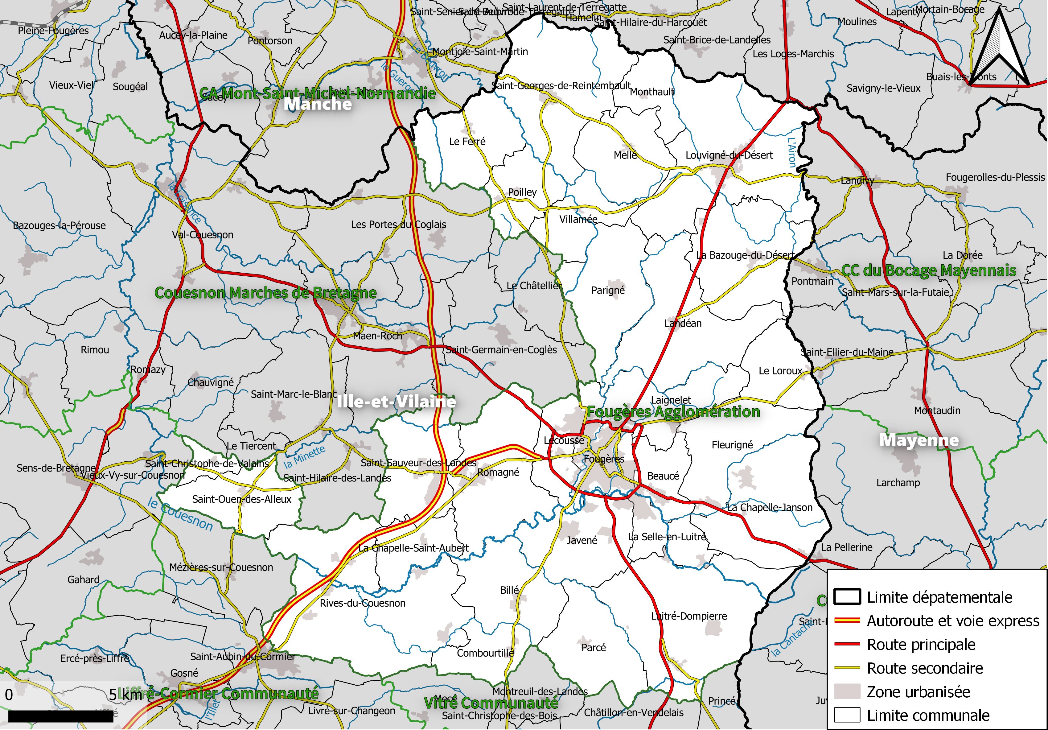 Carte géographique de la Communauté d'agglomération Fougères Agglomération, département d'Ille-et-Vilaine, France. Composition au 1er janvier 2019.